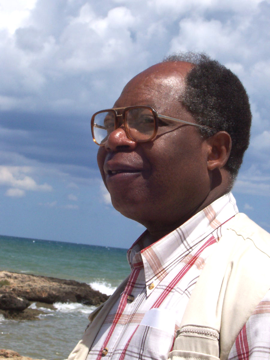 Una foto recente del Professor Pedro Francisco Miguel